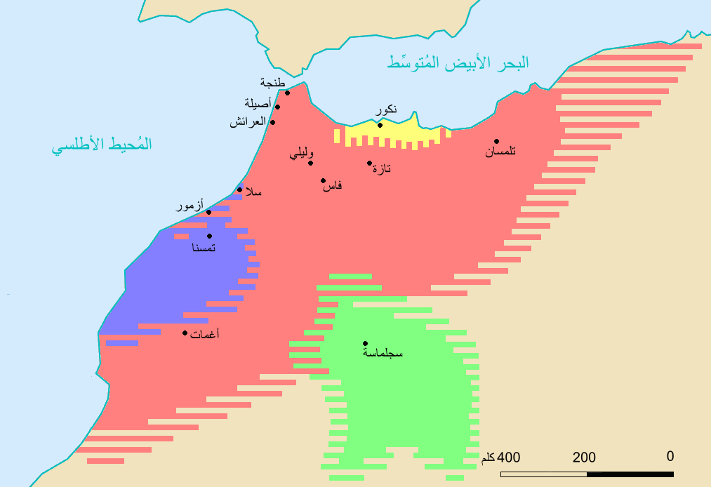 خارطة للمغرب خلال العهد الإدريسي، تستندُ في المقام الأوَّل على: - خرائط موقع يورأطلس [1][2] - وأعمال پيتر شيپرد [3]. - ووصف تقسيم المملكة المغربيَّة بين ورثة إدريس الثاني سنة 828م [4][5][6].